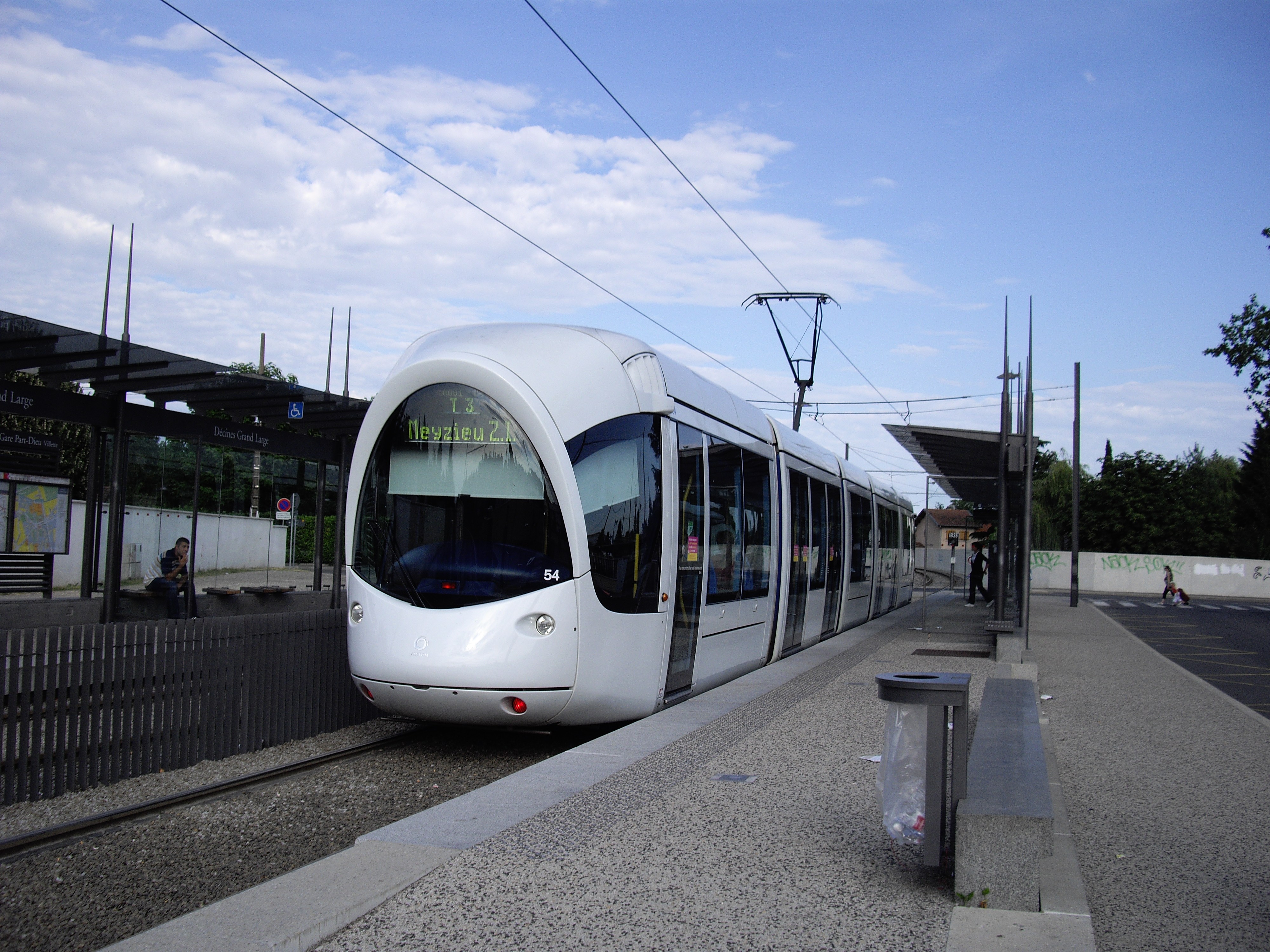 Rame 854 de la ligne T3 direction Meyzieu Z.I. à Décines Grand Large le 5 Juillet 2008